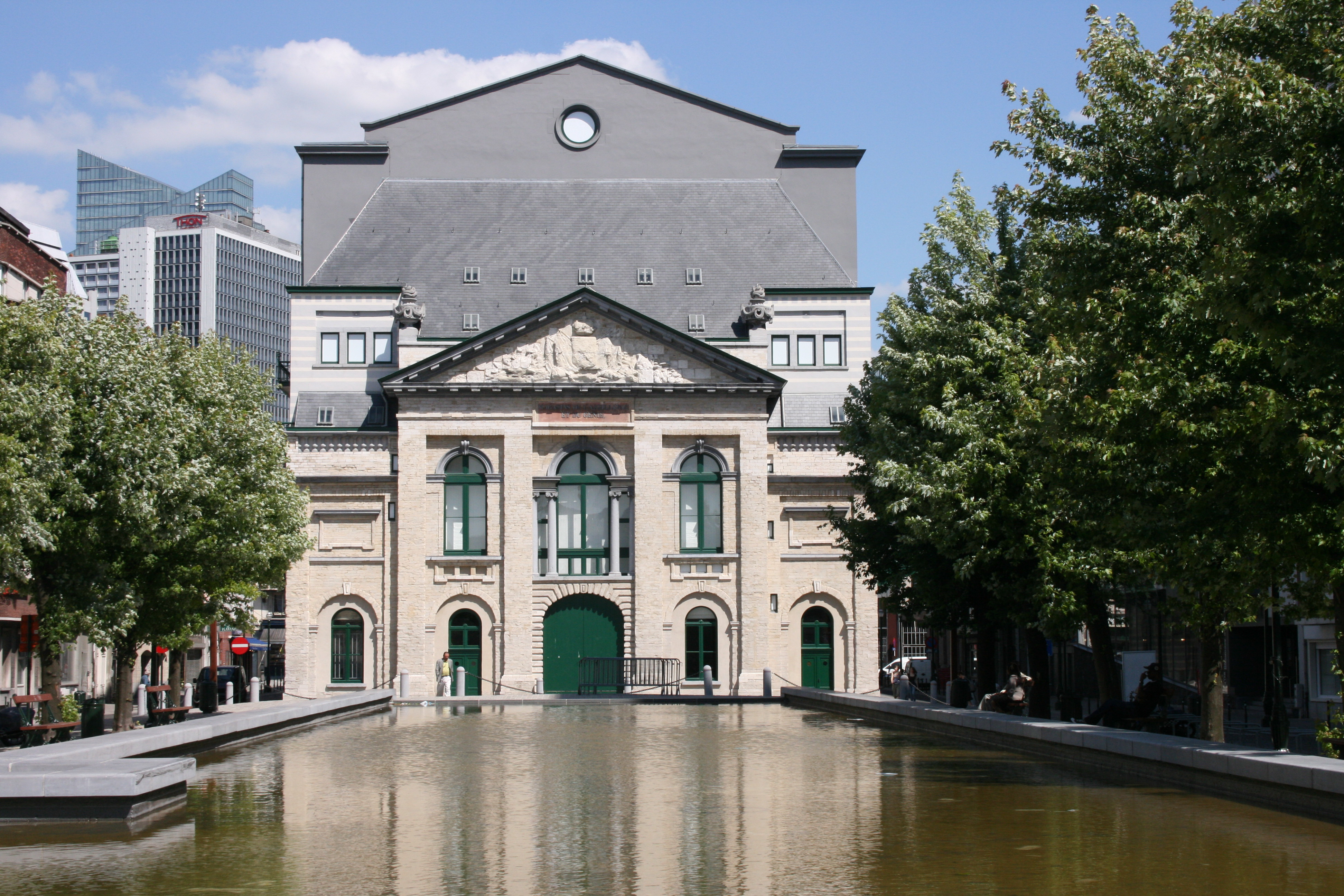 Théâtre Royal Flamand à Bruxelles. Façade arrière: ancien magasin d'artillerie du génie